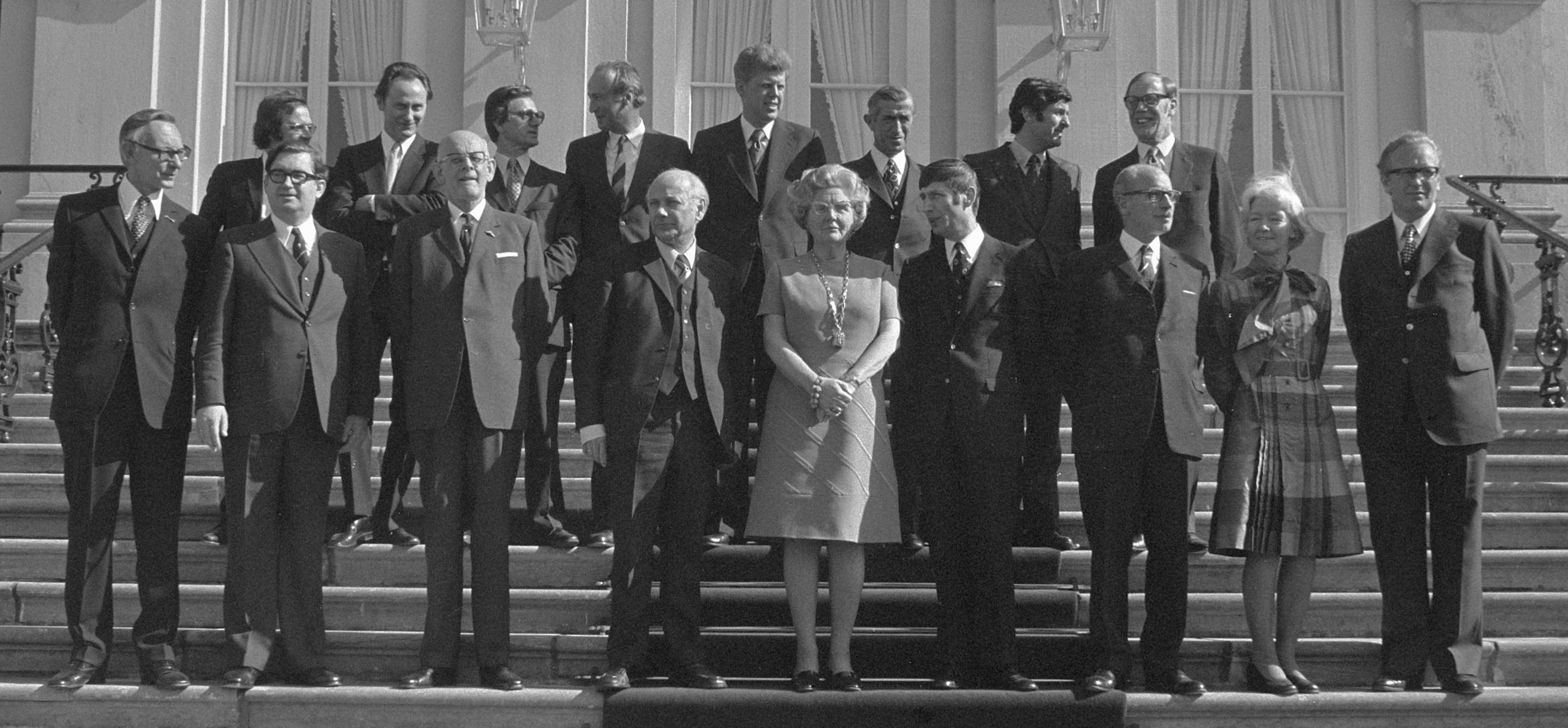 De bordesscène van het kabinet-Den Uyl bij Huis ten Bosch op 11 mei 1973